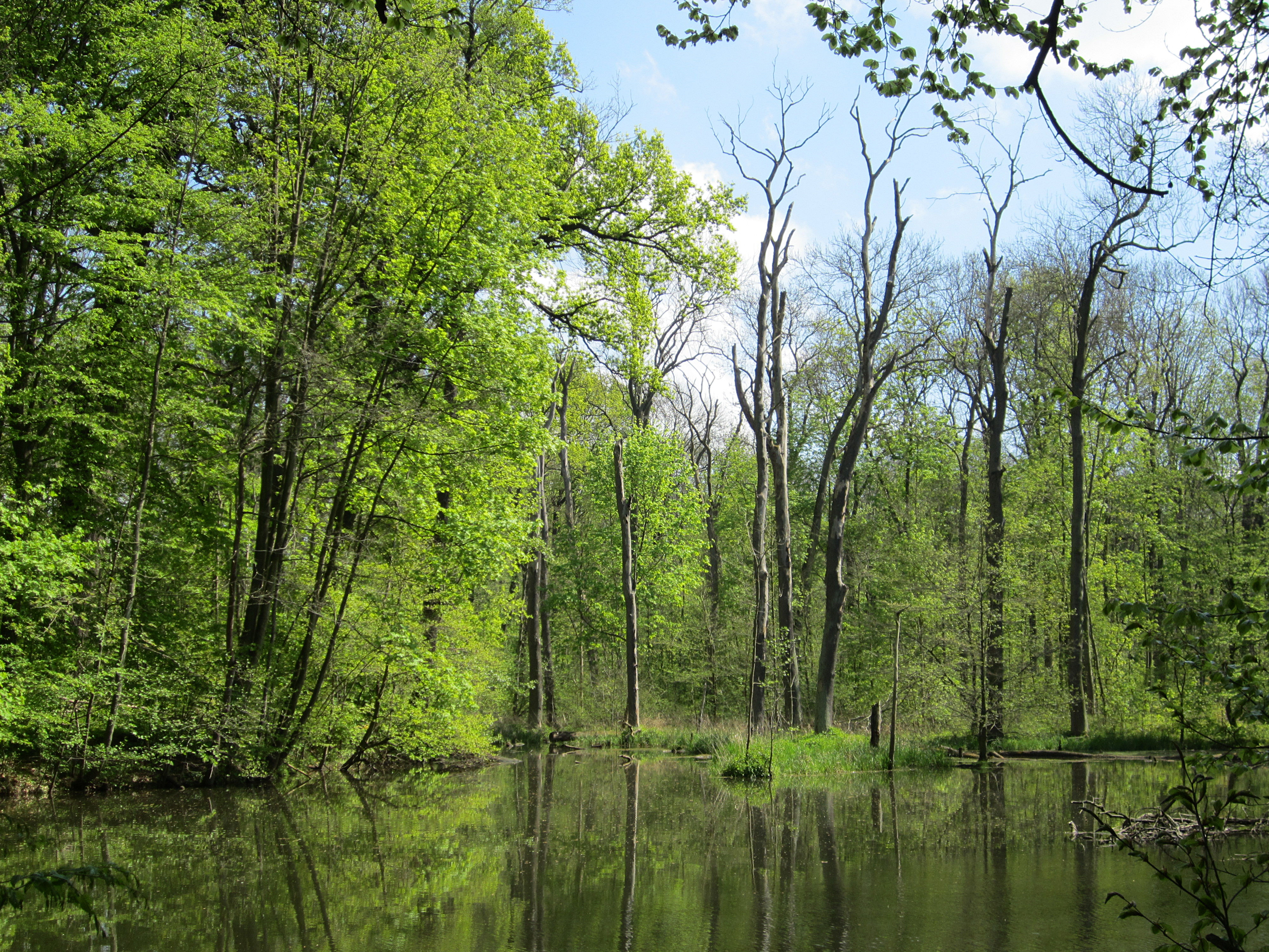 Teiche der Paußnitz im Leipziger Auenwald/Elster- und Pleiße-Auewald (LSG l 10/NSG L 10)